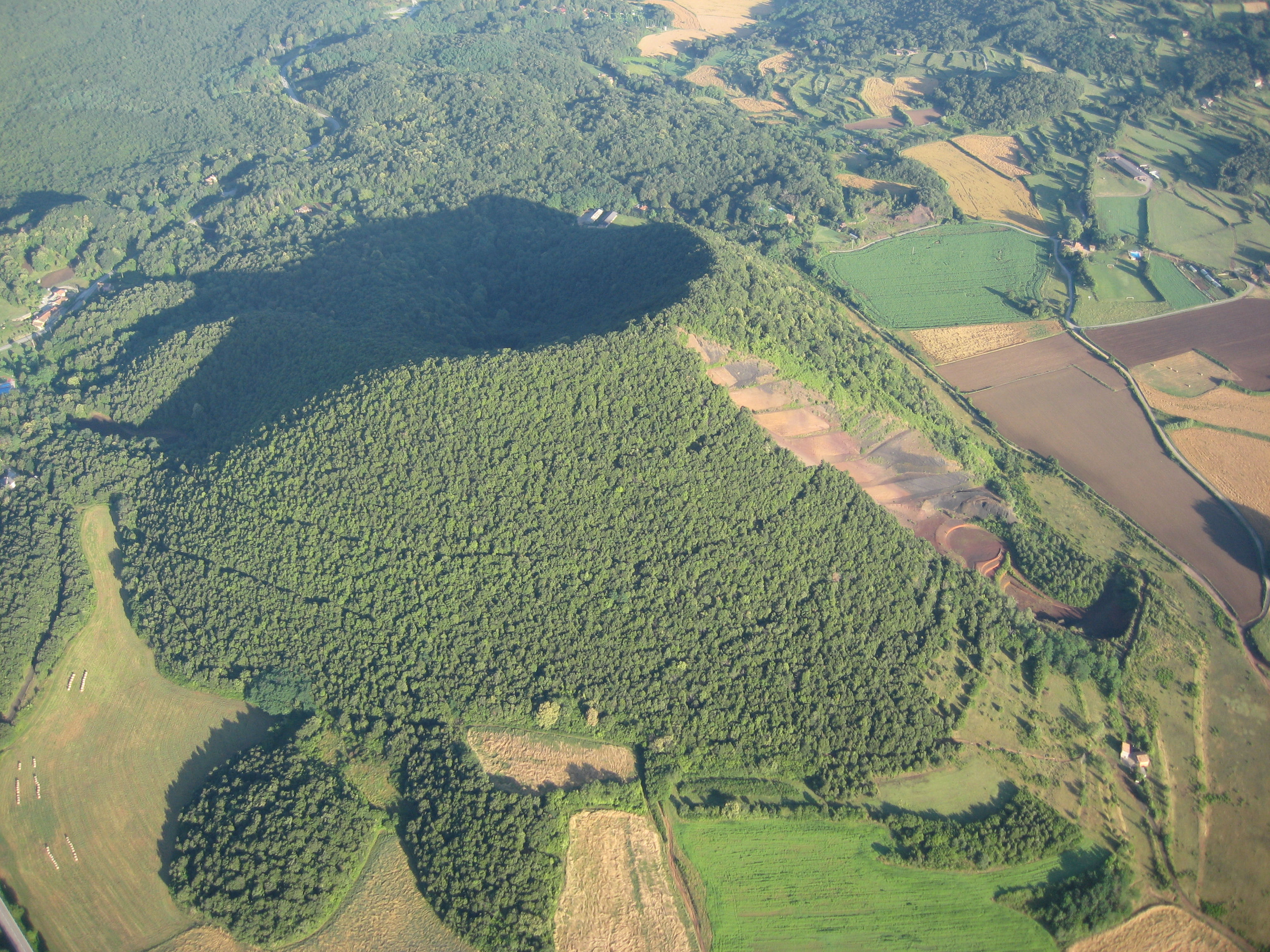 Vista aèria del Volcà Croscat, a la Garrotxa